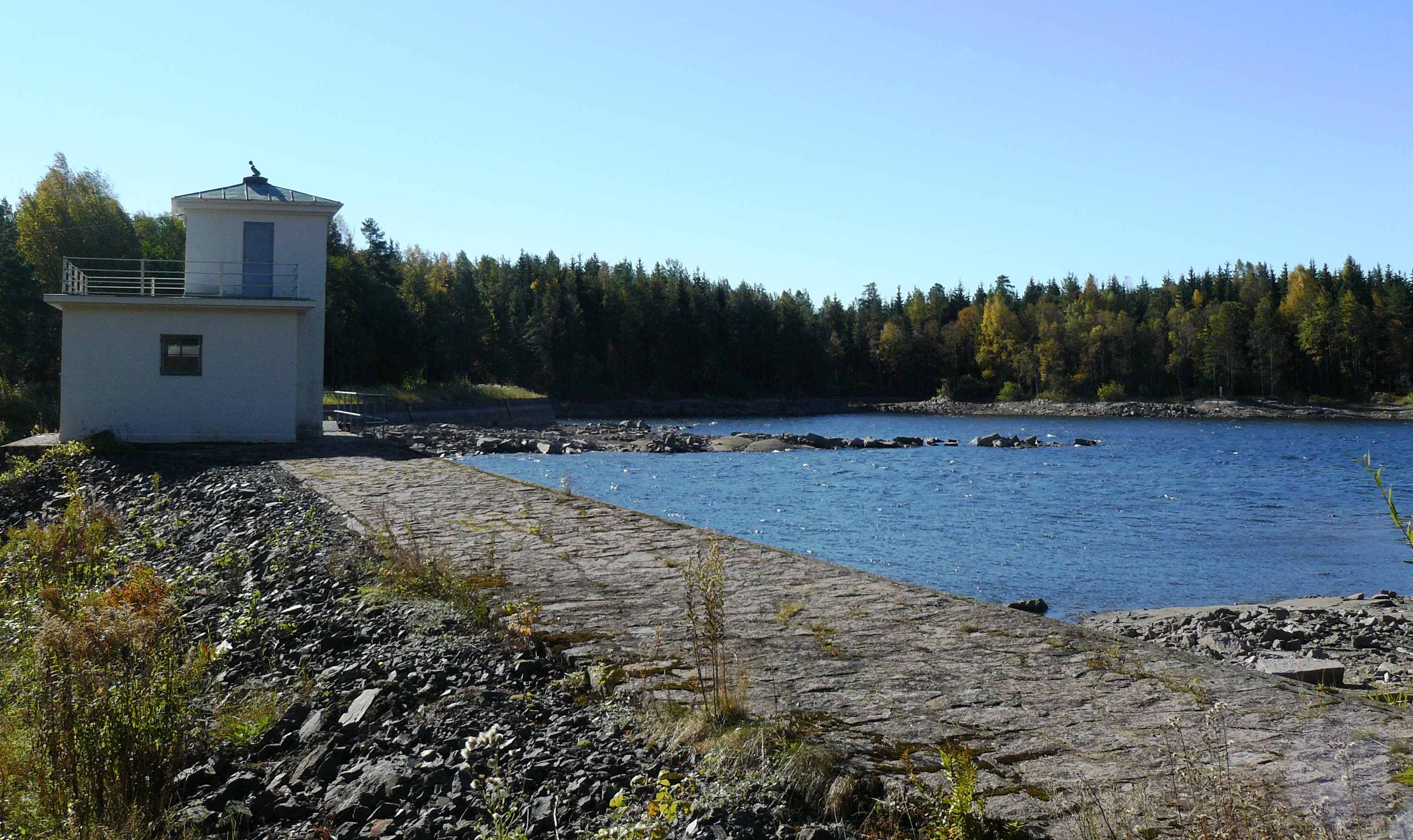 Alunsjødammen, Lillomarka, Oslo